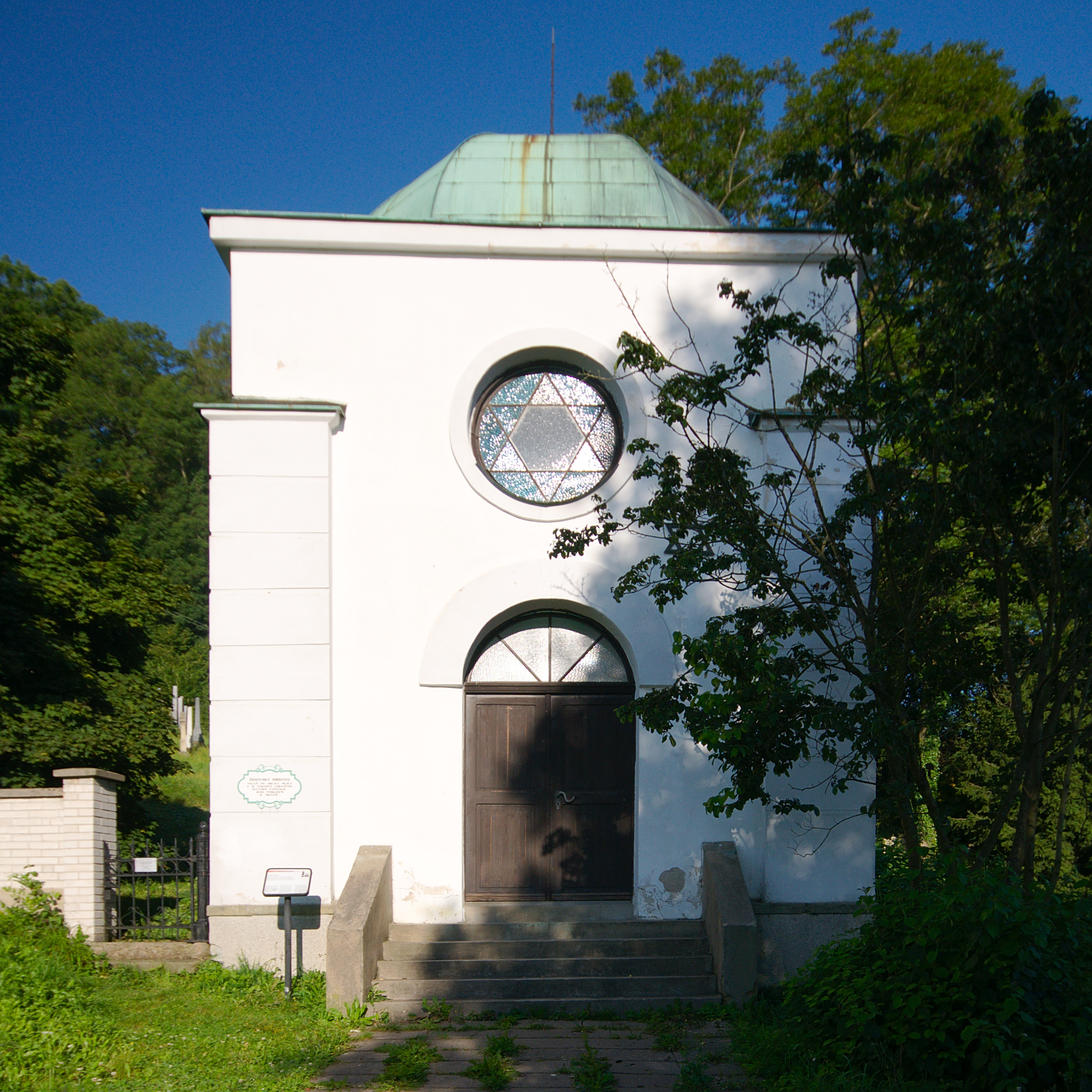 Obřadní síň židovského hřbitova, Žamberk, okres Ústí nad Orlicí